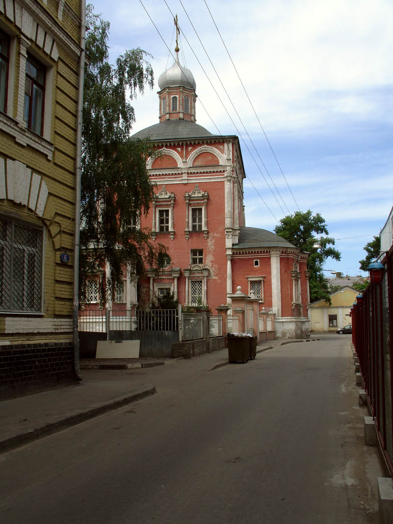 Moscow, Church in Barashi, 1650-1701, Podsosensky Lane RUSSIAN: Москва, храм Введения в Барашах, 1650-1701, Подсосенский переулок